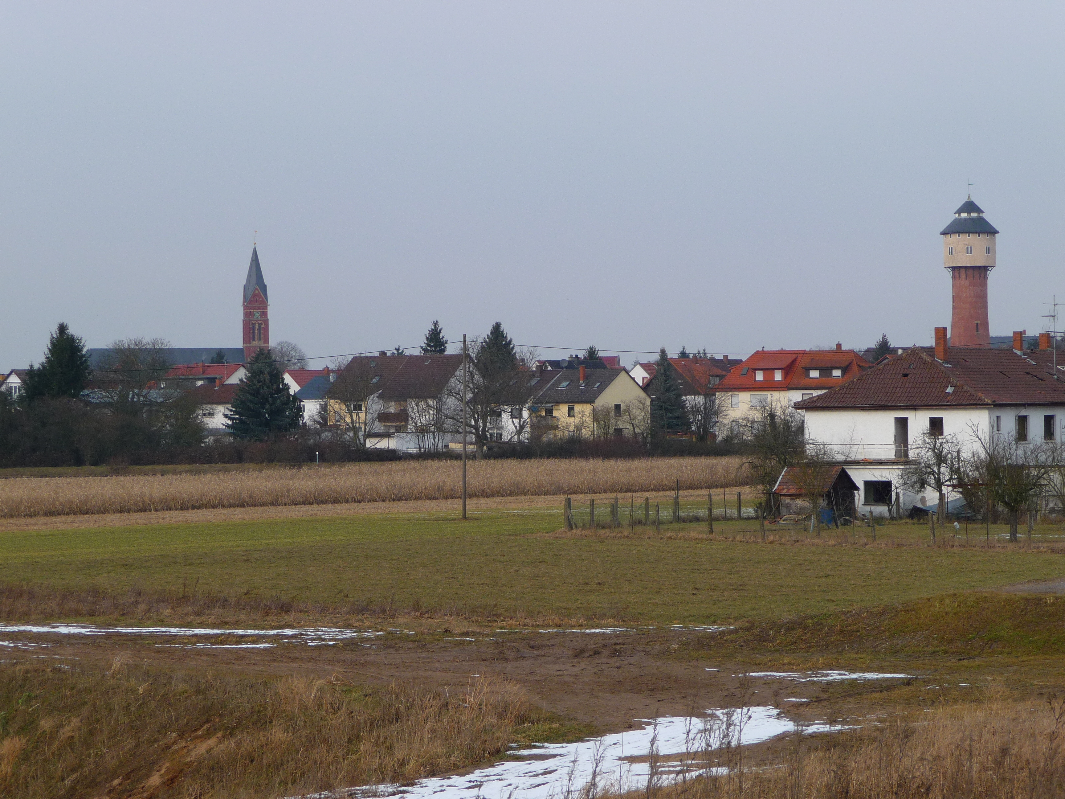 Blick von Süden auf Plankstadt (Rhein-Neckar-Kreis), links Turm der katholischen Kirche St. Nikolaus, rechts Wasserturm